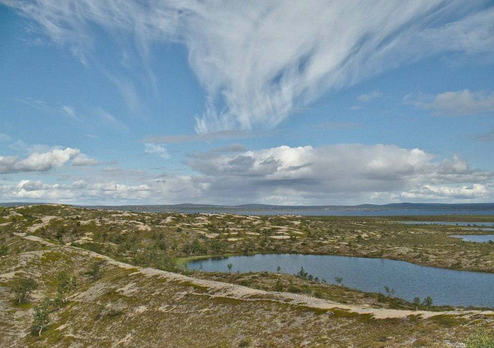 Sand dunes of Pöyrisjärvi.